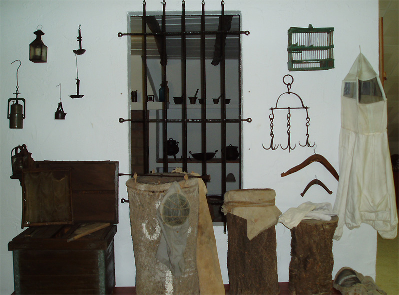 Museo de Estepona: sección etnográfica.